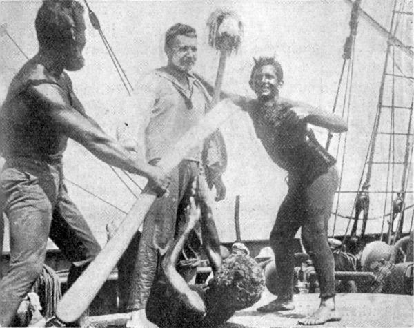 Golenie w czasie chrztu rownikowego. Rejs przez równik do Brazylii; 13 VII 1923r